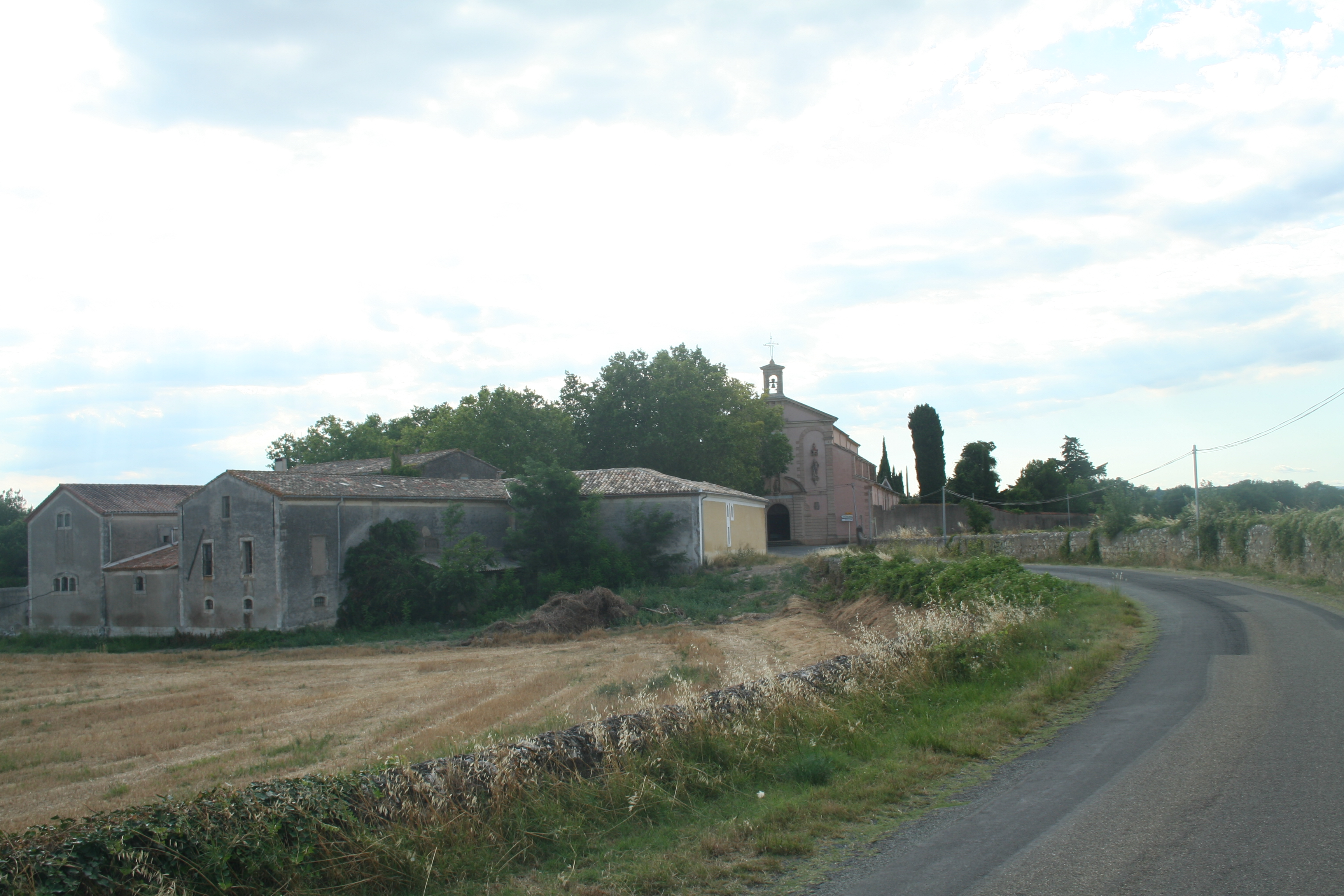 Caux (Hérault) - Chartreuse de Mougères - Église Notre-Dame de Pitié - vue générale